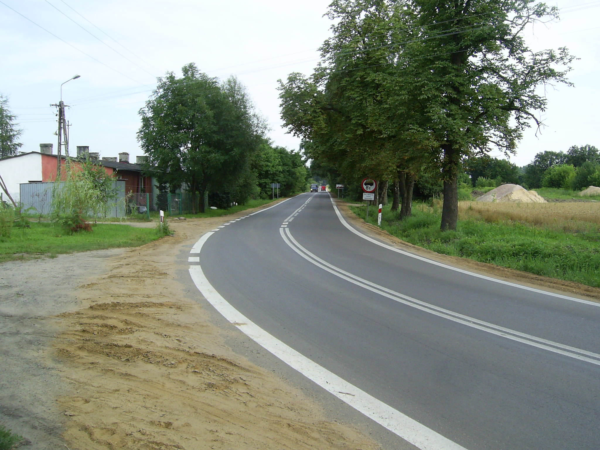 Biskupice, droga wojewódzka 720 Błonie-Brwinów